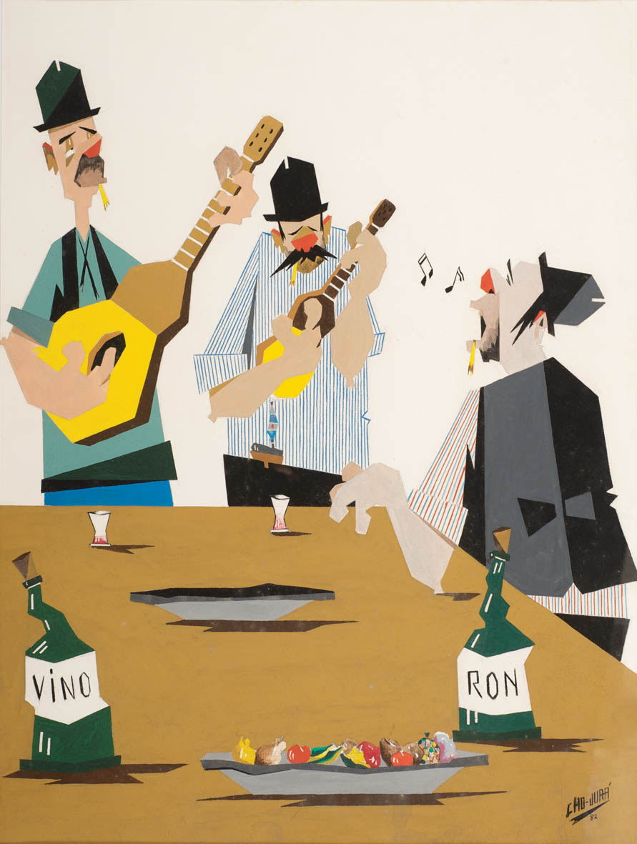 Sin Título 1